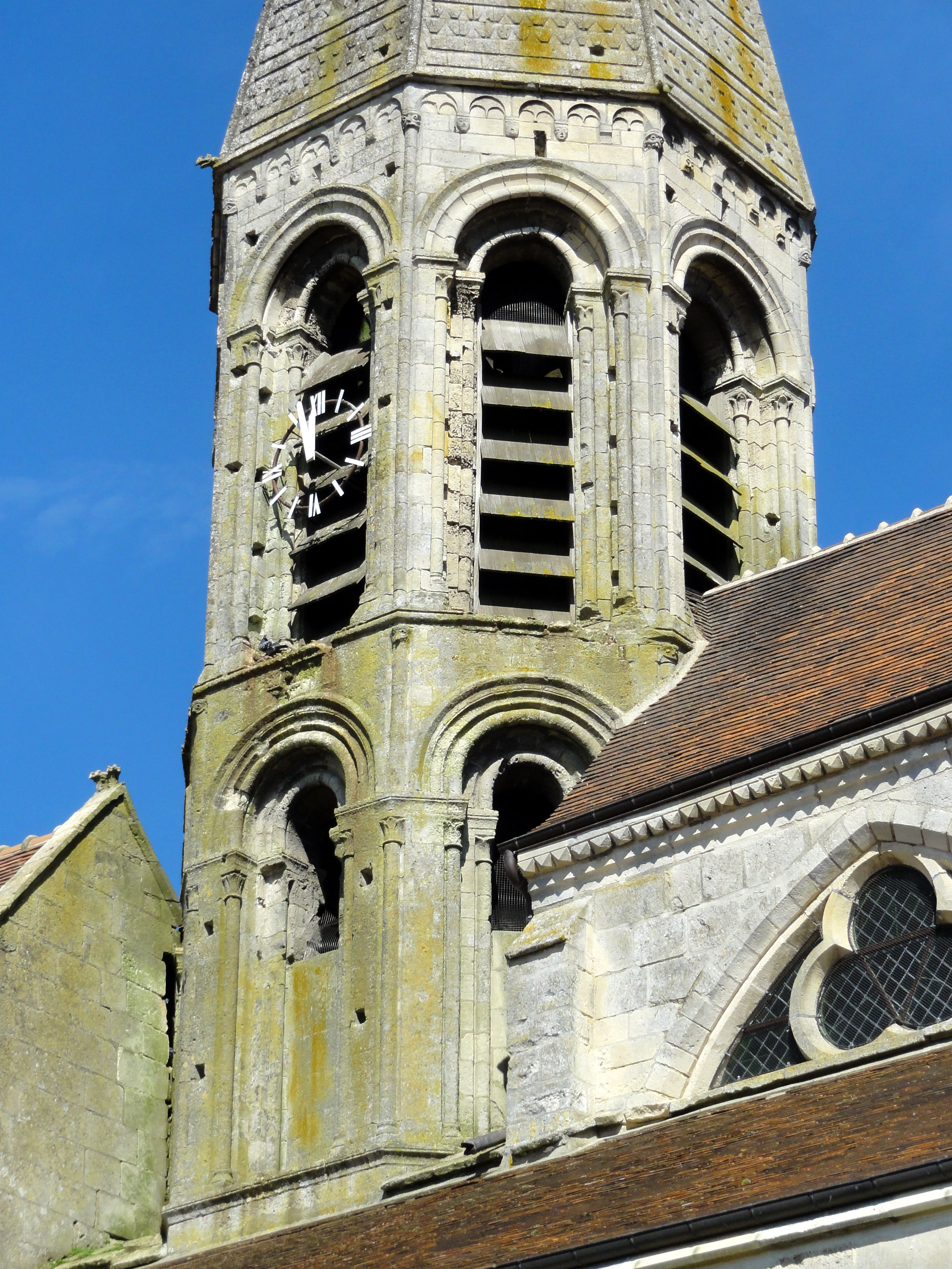 Vue rapprochée du clocher depuis le sud-est.